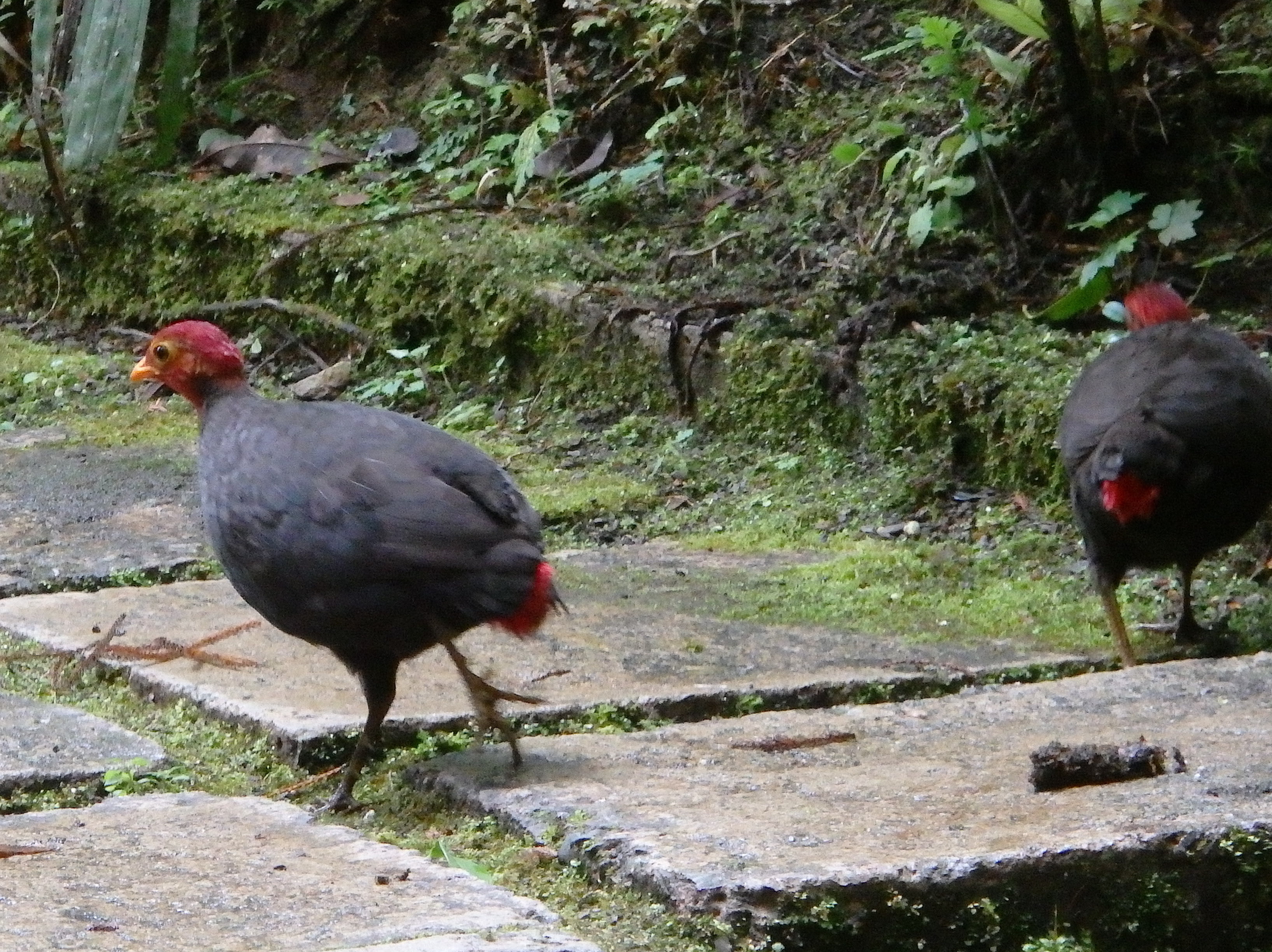 Kinabalu Park, Ranau, Sabah, Malaysia